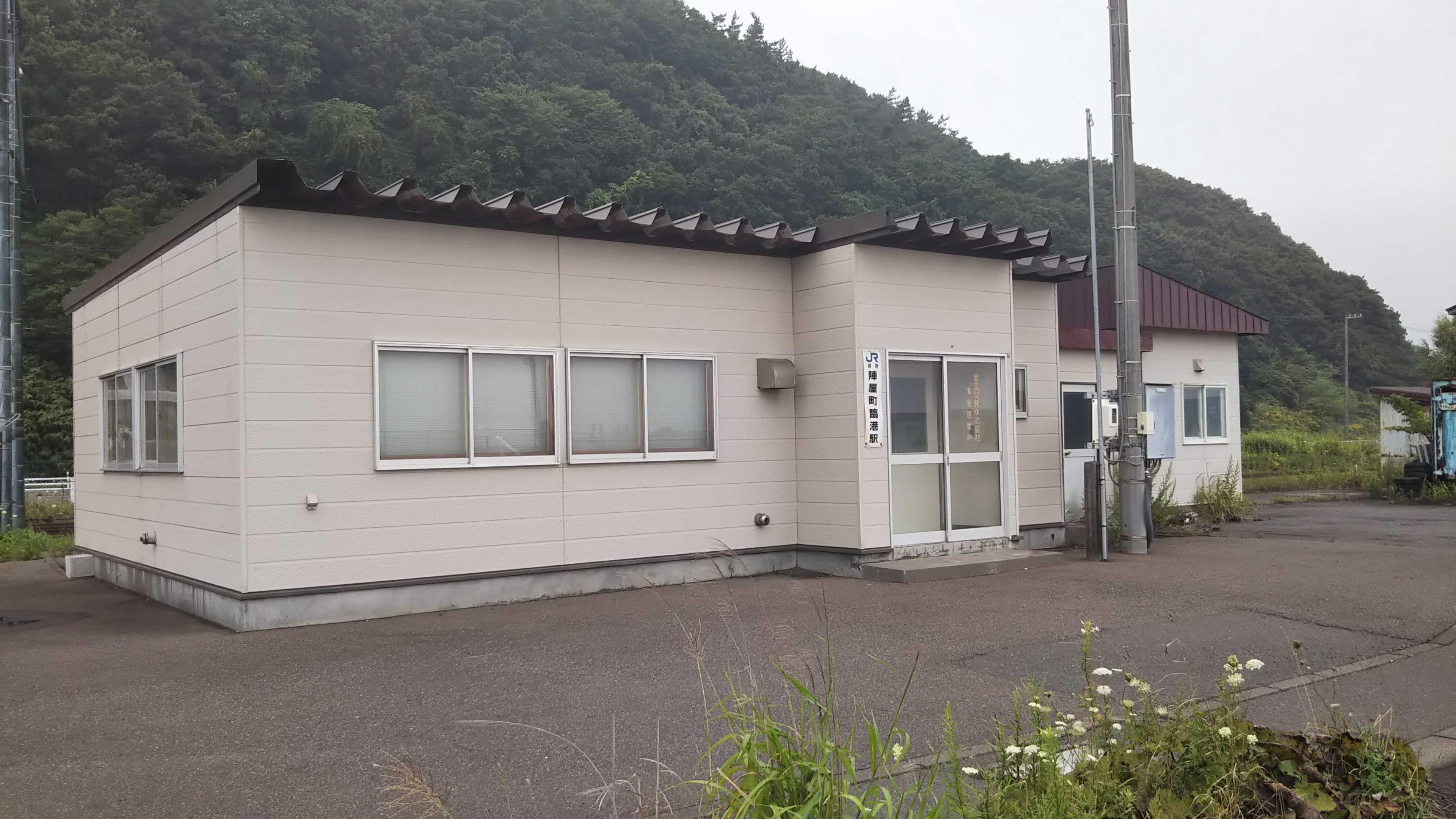 陣屋町臨港駅駅舎（2019年8月）